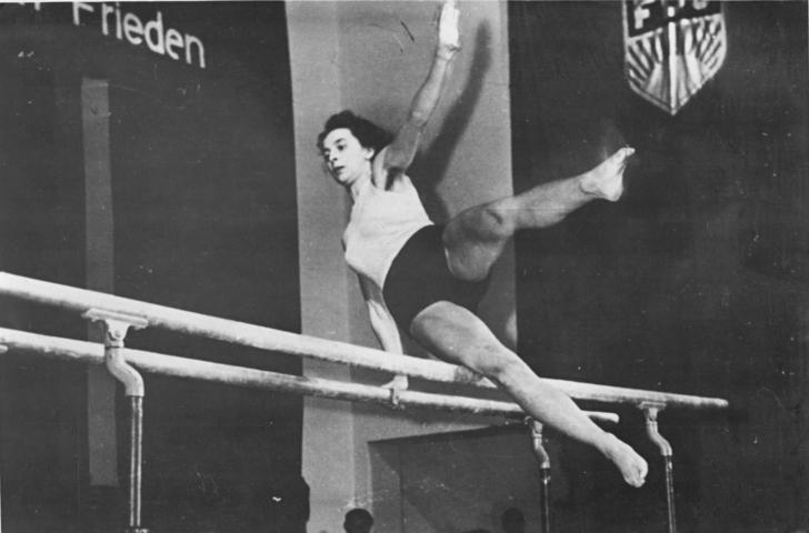 Ursula Pagel Illus Th.B.D. 24.10.50 Die Meisterschaften der Deutschen Demokratischen Republik im Geräteturnen fanden am 21. und 22.10.50 in der Sportschule Greiz in Thüringen statt. Der Nachwuchs zeigte hier besonders gute Leistungen. UBz: Ursula Pagel (Bartel?) Leipzig, bei Übungen am Barren.